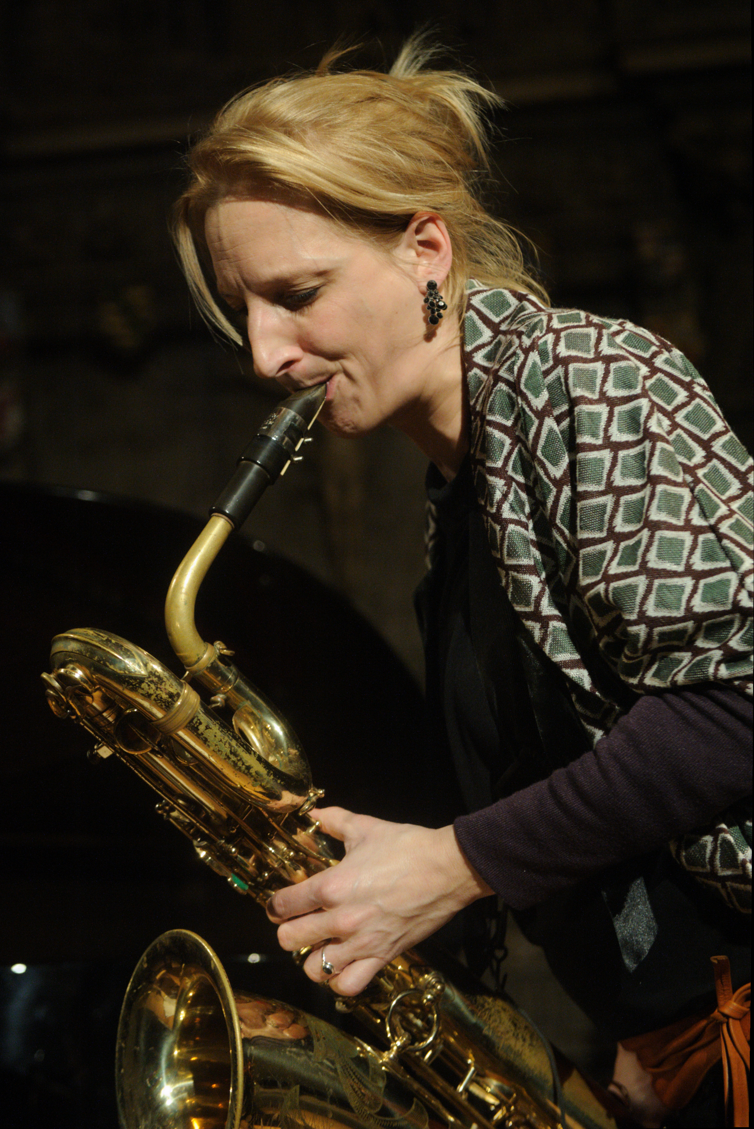 Alexandra Lehmler bei einem Konzert in der Stadtkirche Darmstadt am 31.01.2015